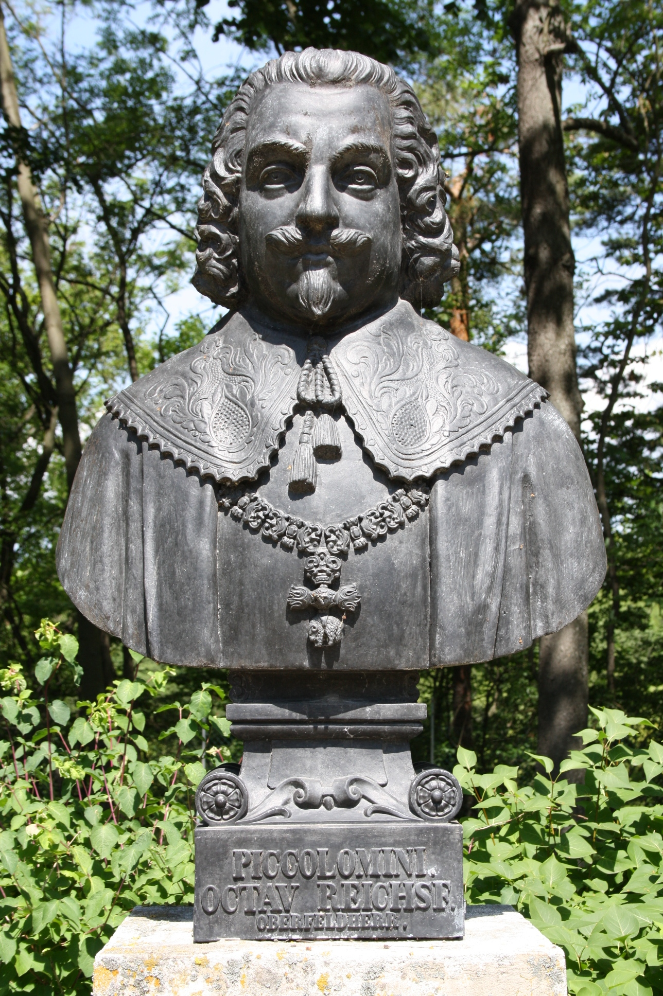 Büste in der Gedenkstätte Heldenberg (Niederösterreich)